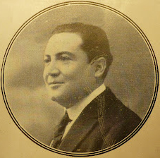 Imágen de Julio Cesar Raffo de la Reta.